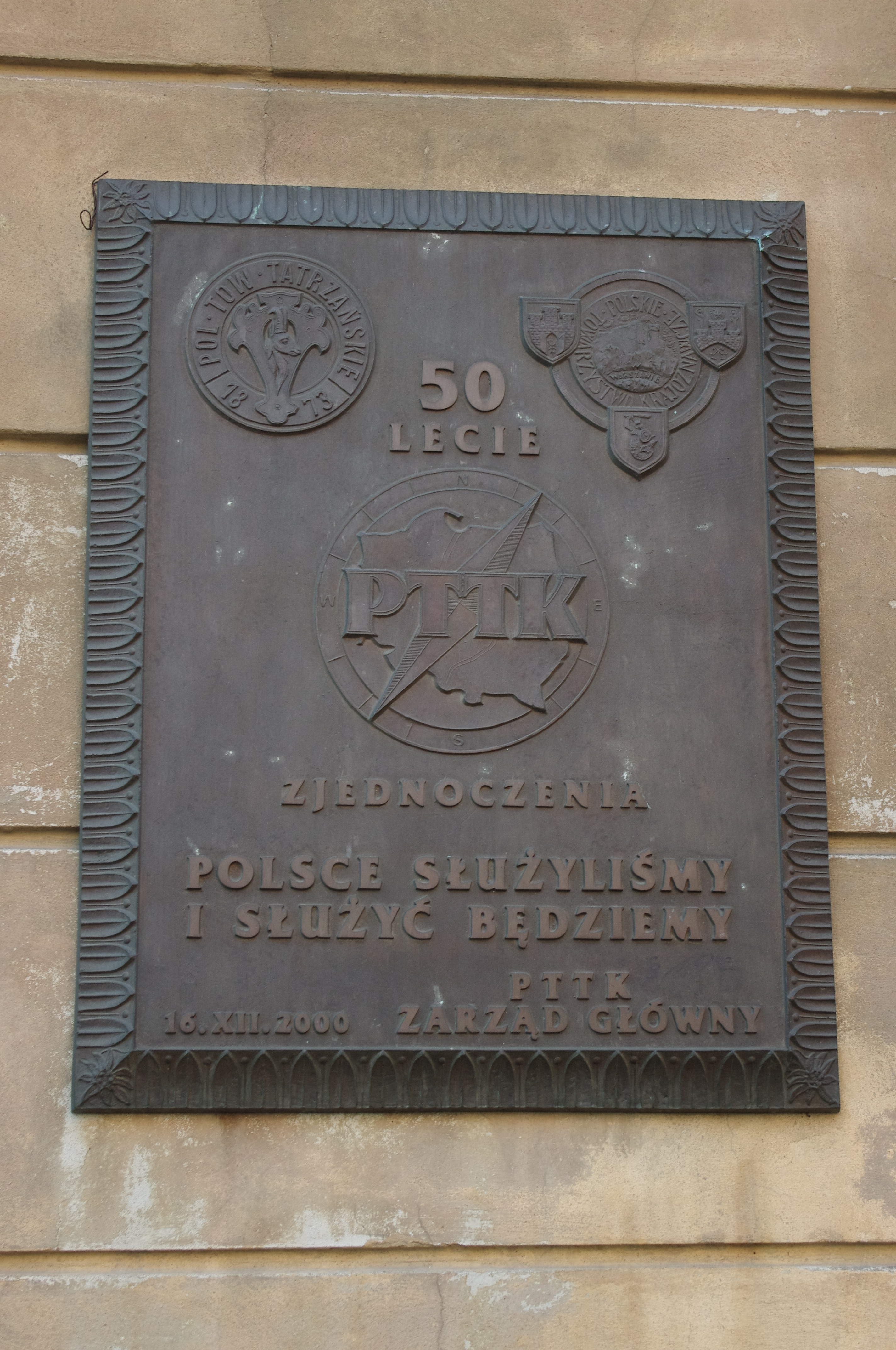 Tablica upamiętniająca 50-lecie PTTK na jego siedzibie na ul. Senatorskiej 11 w Warszawie